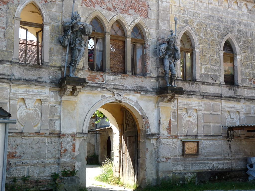 Dvorec Prešnik nad Lopato